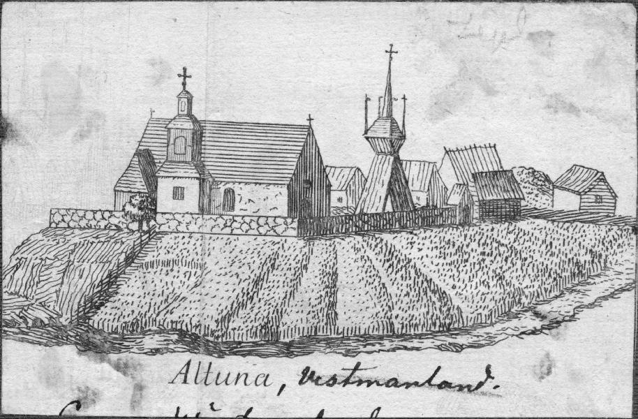 Kyrkan med omgivning. Teckning. Kategori: (01) ExteriörerKyrkan med omgivning. Teckning.